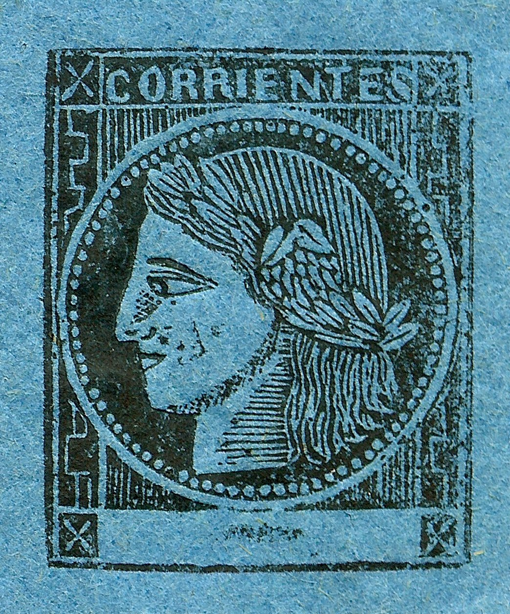 Timbre type Cérès 1860 - Province de Corrientes Argentine / imitation des timbres de France de 1849.